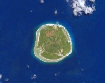 NASA picture